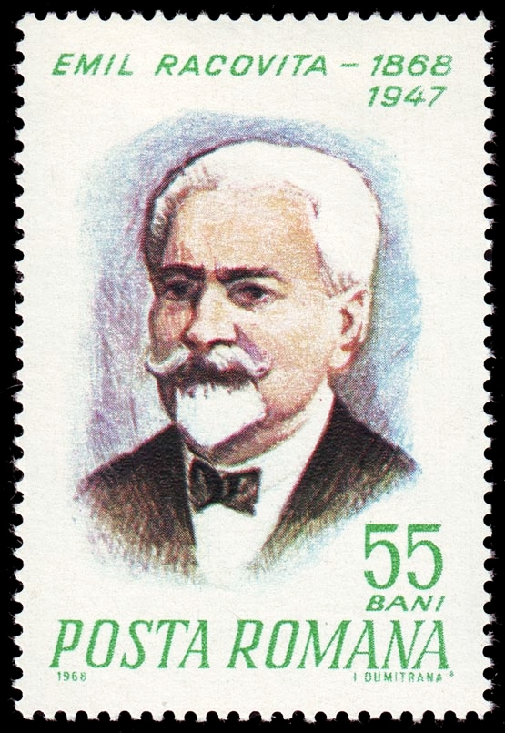 Emil Racovita (1868–1947), biologiste, zoologiste et spéléologue roumain